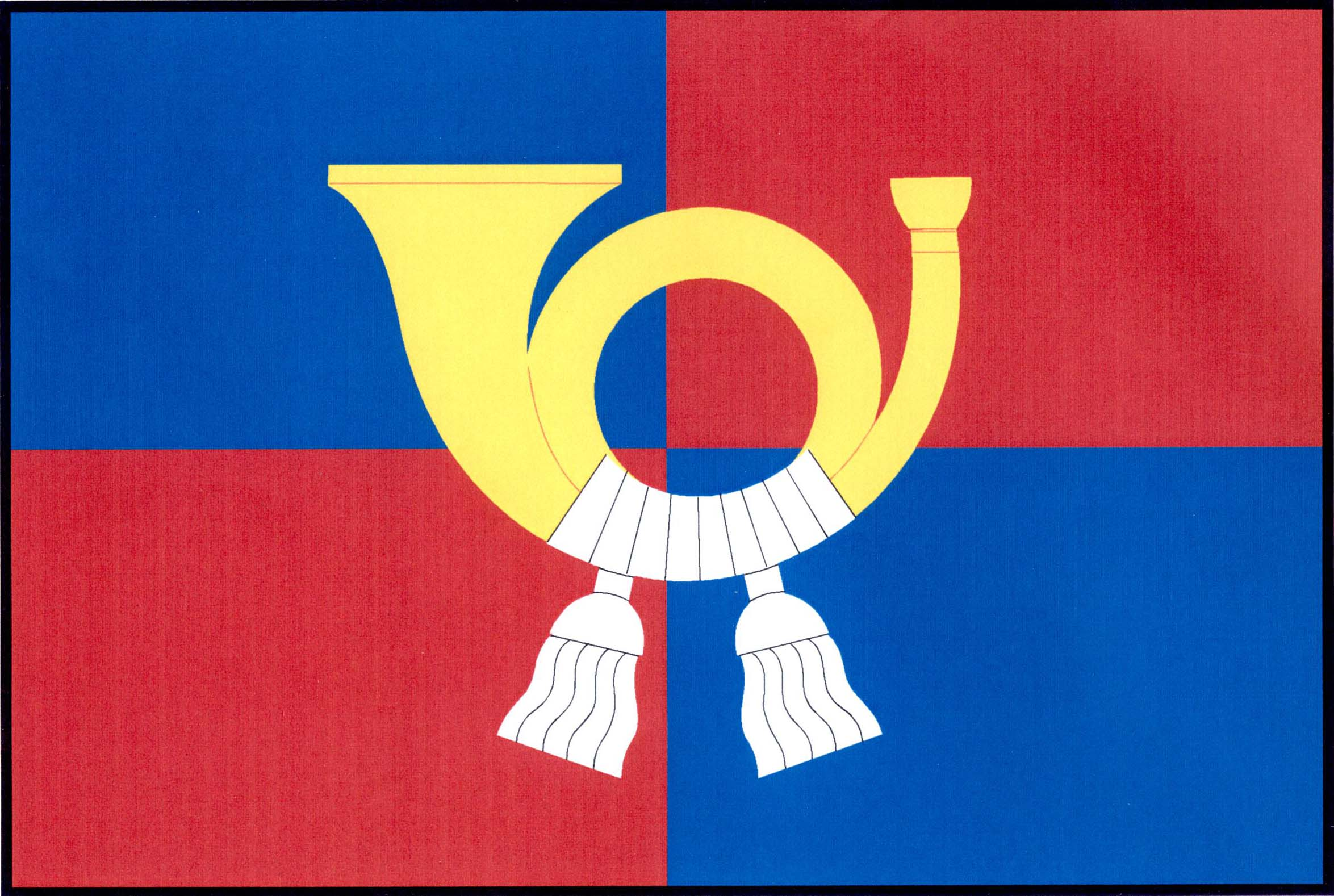 Vlajka obce Grešlové Mýto v okrese Znojmo. Modro-červeně čtvrcený list, uprostřed žlutá poštovní trubka obtočená bílou šňůrou se dvěma třapci. Poměr šířky k délce listu je 2 : 3.